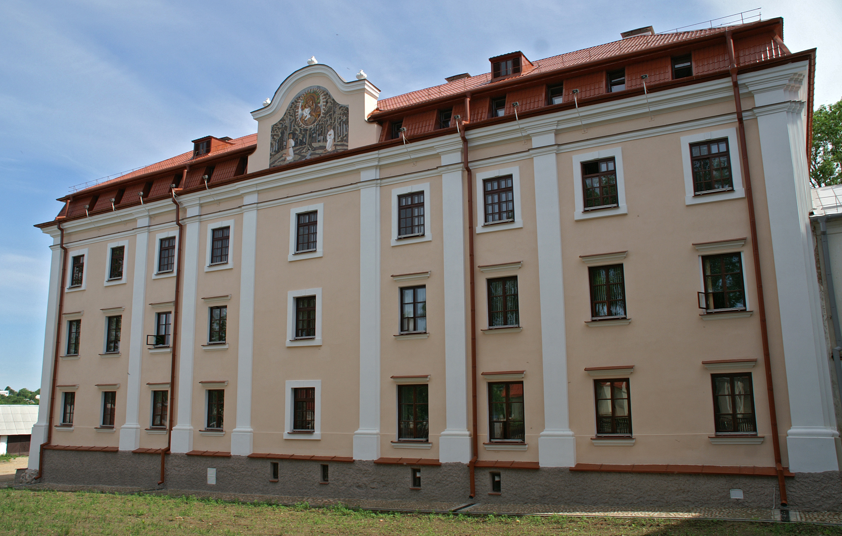 Беларуская (тарашкевіца): Ансамбаль Сьвята-Усьпенскага манастыра:Усьпенскі сабордэкаратыўнае аздабленьне:росьпіс у консе «Спас Пантакратар», арнамэнтальны дэкор на скляпеньнях паўднёвай сакрысьціі і ўсіх нэфаў, іканастас, бакавыя алтарыБогаяўленская царкваКрыжаўзьвіжанская царквазваніцабудынак сэмінарыіжылы корпусгаспадарчыя пабудовы. в. Жыровічы This is a photo of Belarusian heritage monument. Reference number: 411Г000537 ( WLM)